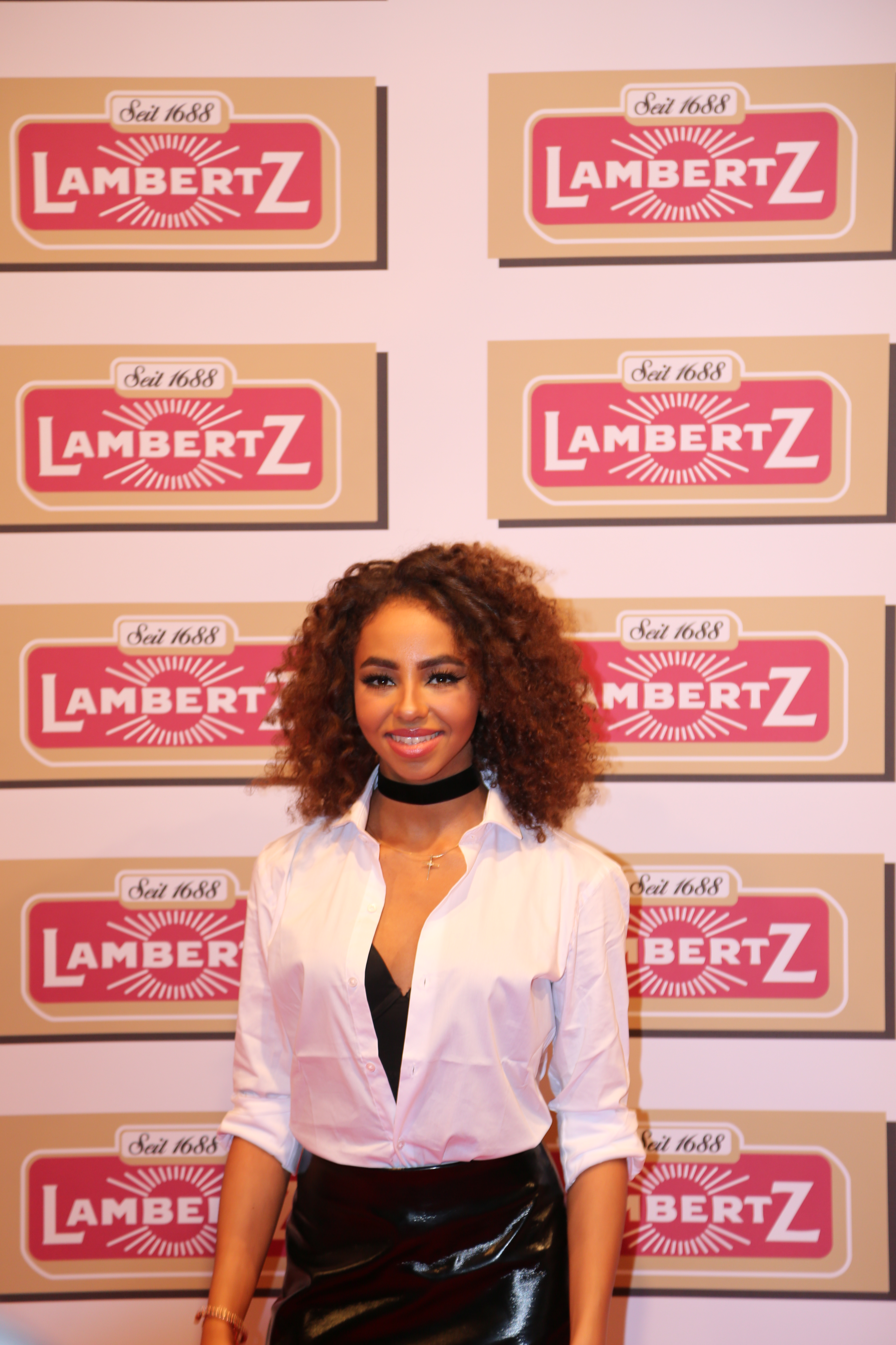 Debbie Schippers bei der Lambertz Monday Night 2017.